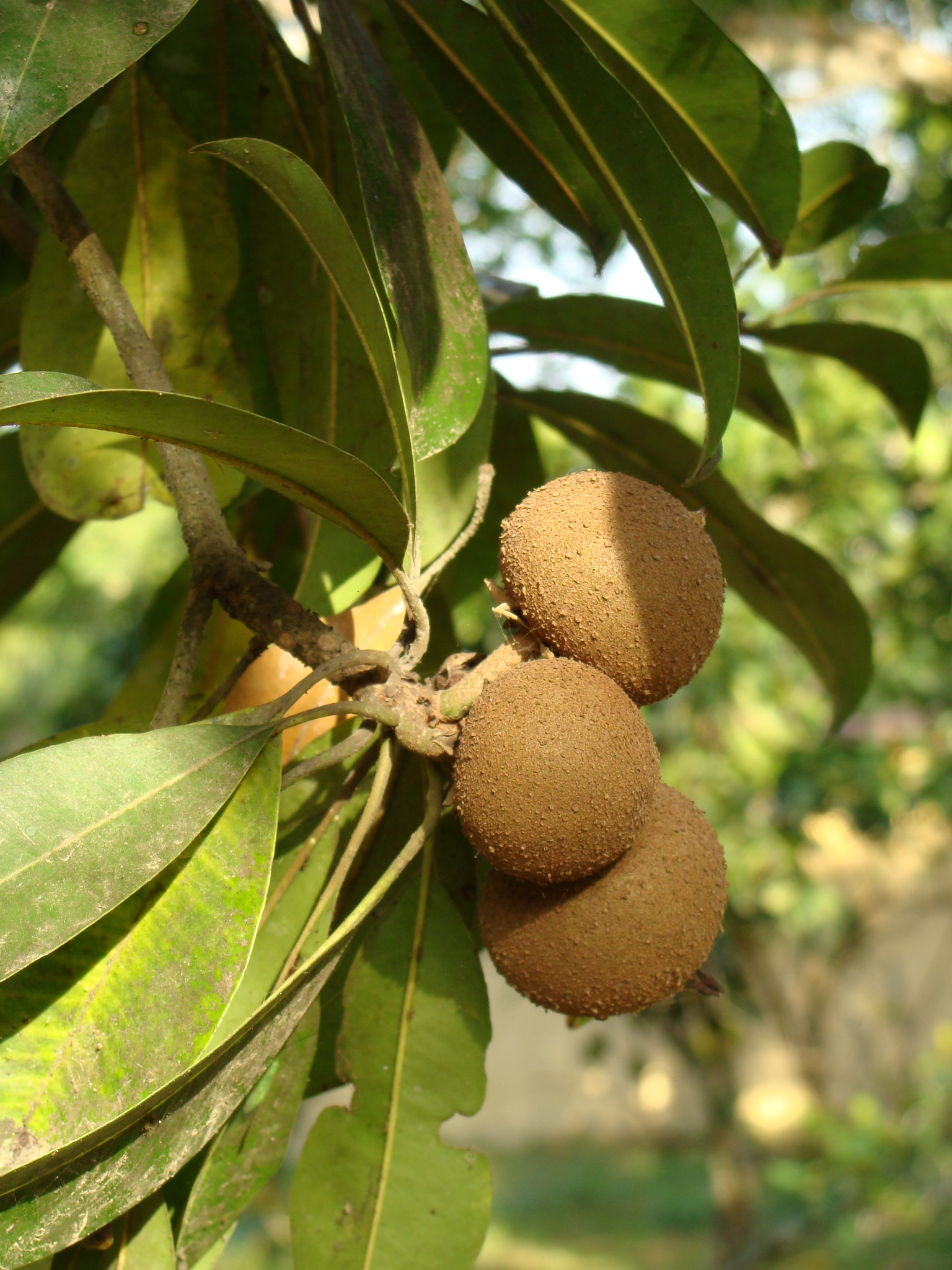 Frutos del níspero criollo (Manilkara huberi), en una finca de Barlovento, Venezuela